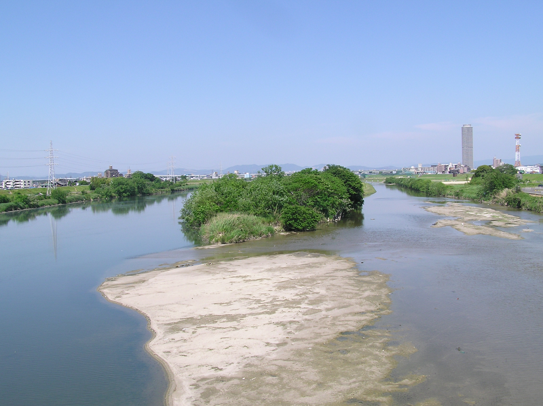 矢田川が庄内川に合流する地点を庄内川橋上から新川中橋に向かって撮影。左が庄内川、右が矢田川。